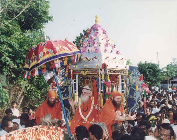 Satguru Sivaya Subramuniyaswami (Gurudeva) in a Malaysian parade.